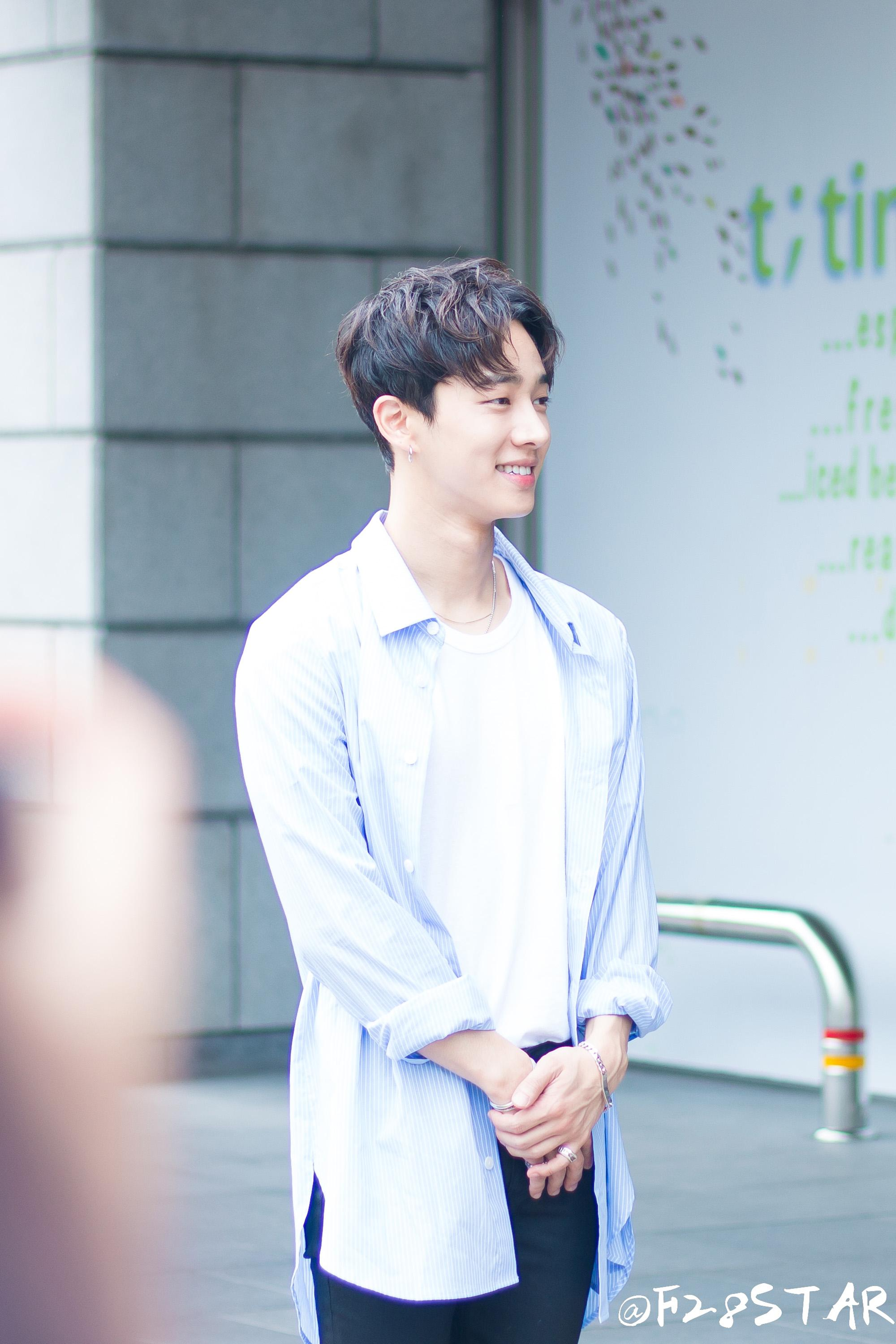 조선말: 20170819 해피투게더 출근길 이기광